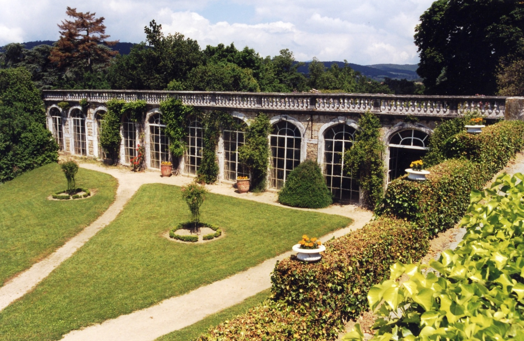 Saint-Clair (Ardèche) Gourdan orangerie